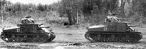 Tank Lee M3A3 v bitvě u Kurska